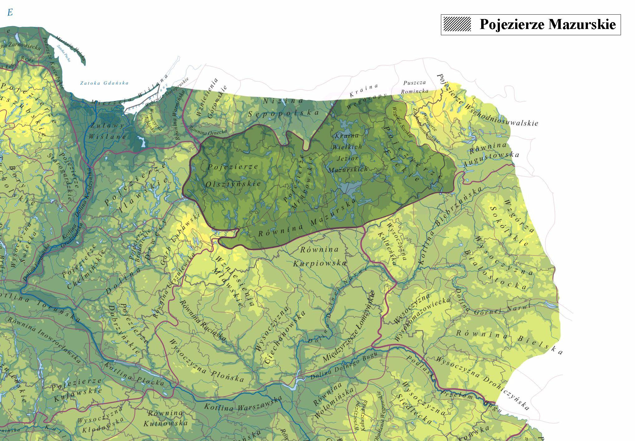 Pojezierze Mazurskie